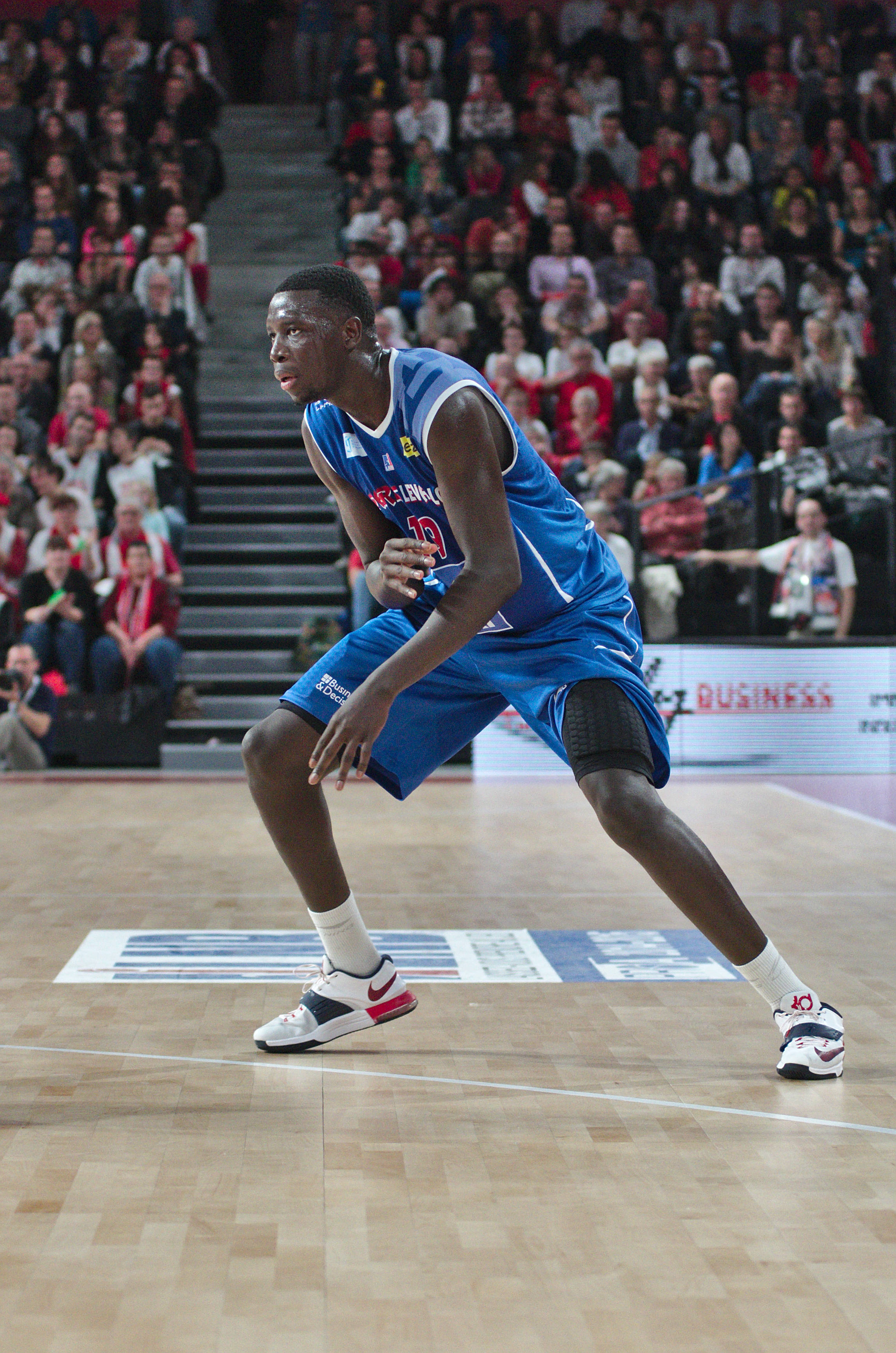 JLB vs PLB - 20141115 - Sané (PLB)